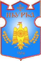 Герб города Нюрба, Республика Саха (Якутия)